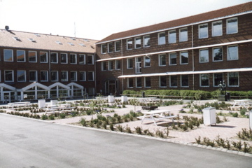 Nykøbing Katedralskole